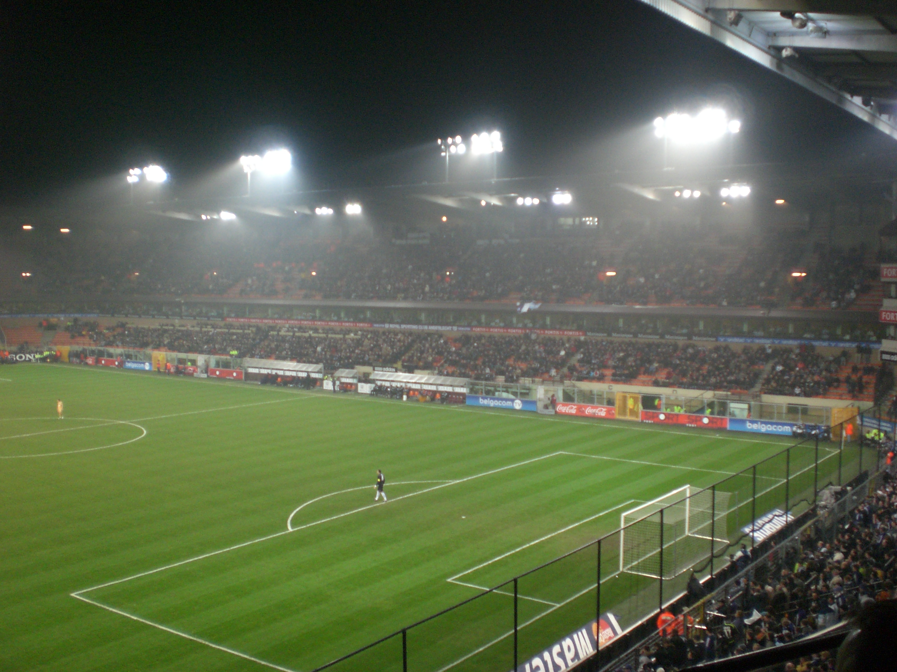 Vue de la tribune 1 du Stade Constant Vanden Stock, depuis la tribune 4. Photo prise le 13/02/08, lors du match de 1/16ème de coupe UEFA entre le RSC Anderlecht et les Girondins de Bordeaux (2-1).